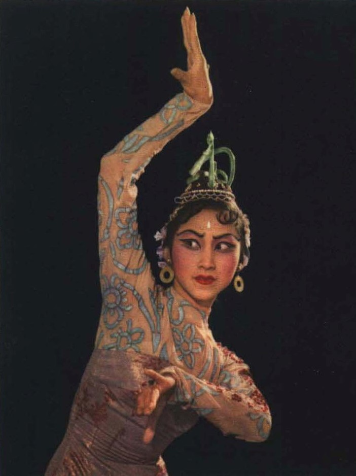 1963-01 1963年 陈爱莲